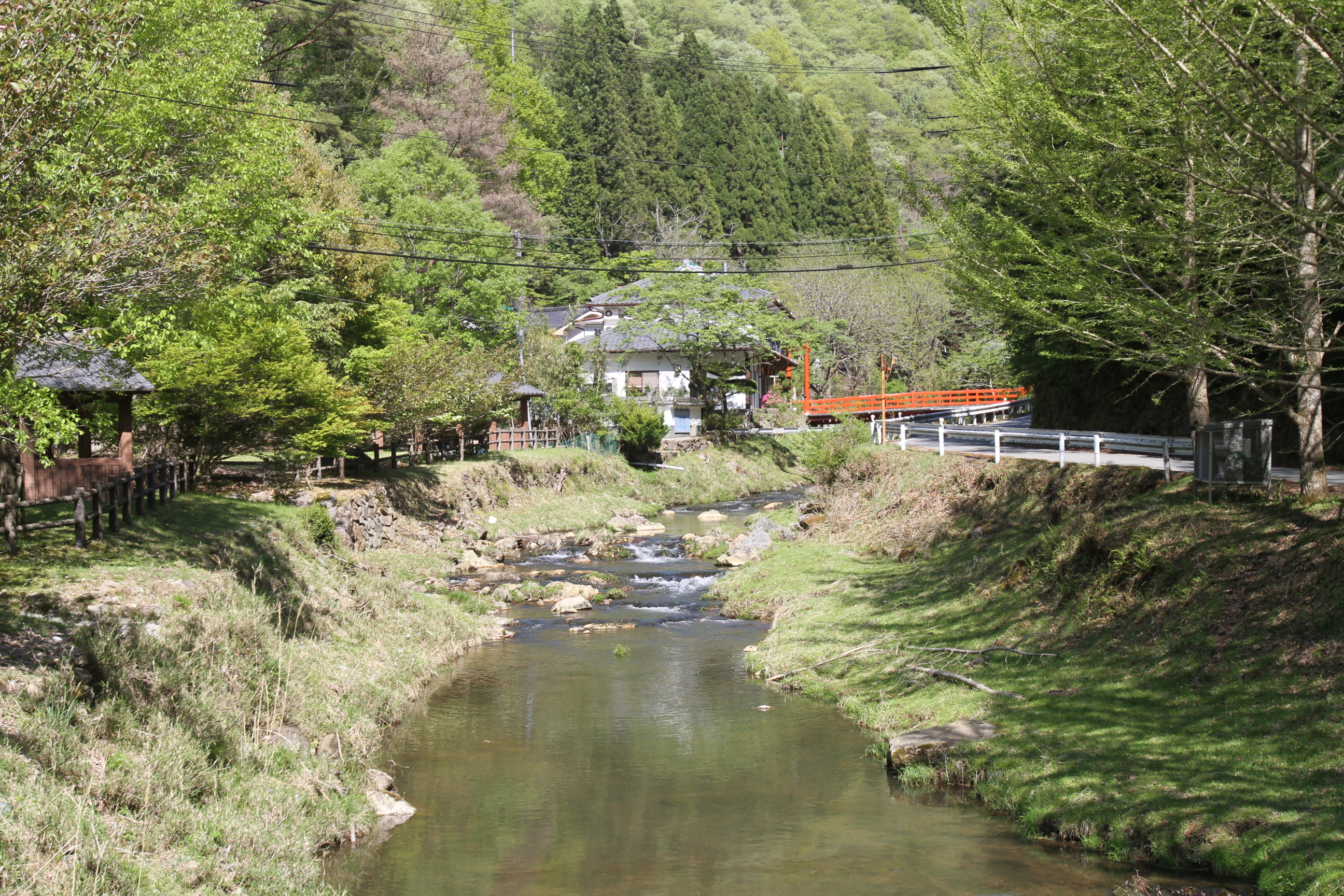 hatsukagawa3